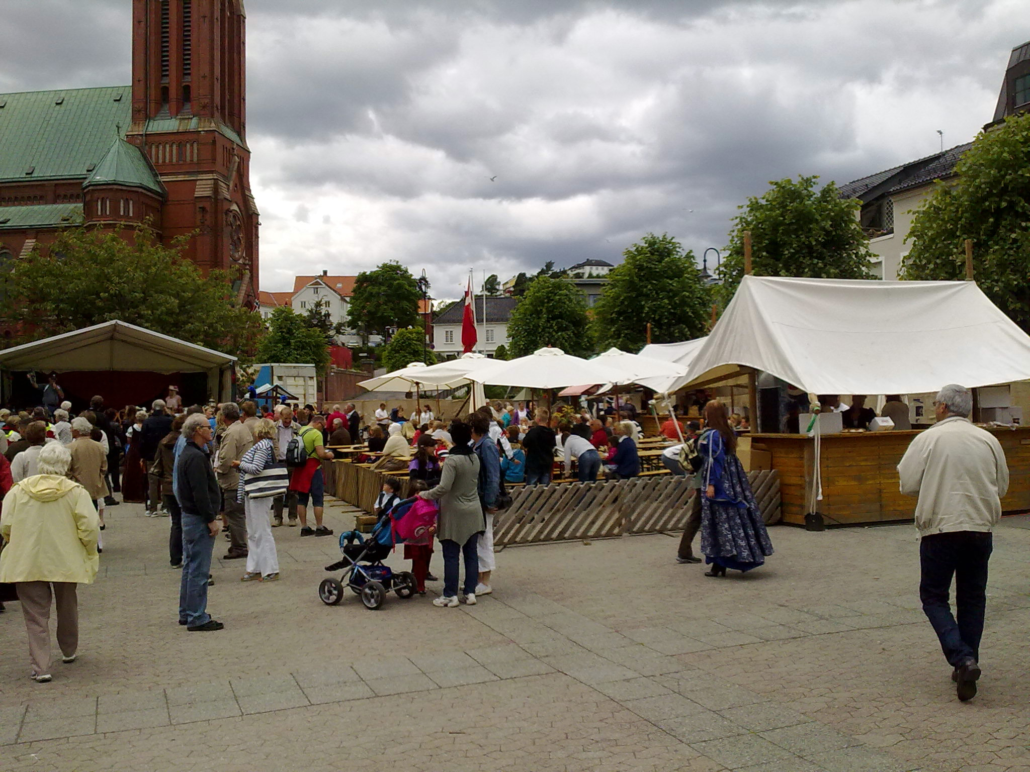 Kjæmpestaden 2010 - Kanalplassen